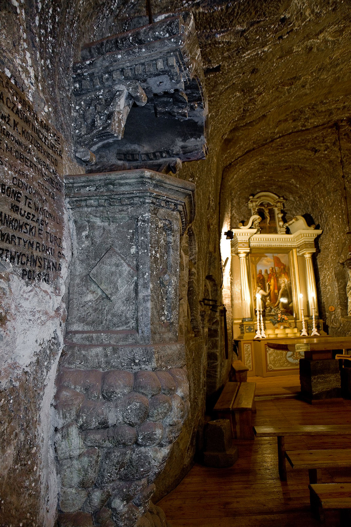 Bochnia - Kaplica Św. Kingi w Kopalni Soli